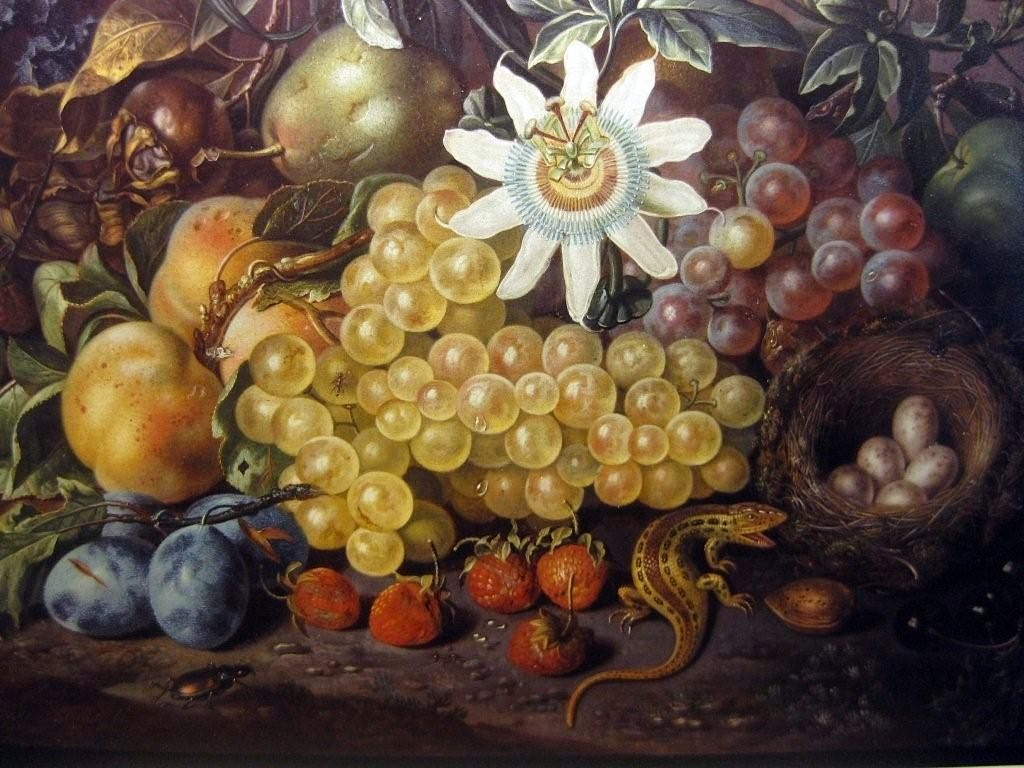 Still Life